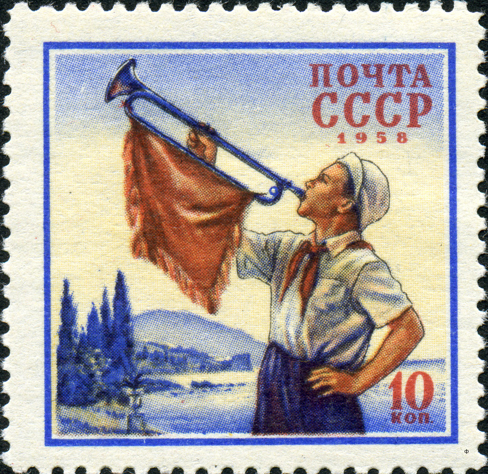 Почтовая марка СССР из серии «К Международному дню защиты детей (1.6)», выпущенная в мае 1958 года. На марке изображён горнист в пионерлагере «Артек». Художник — Л. Голованов. Тираж — 2 млн экземпляров. Номер по каталогу ЦФА — 2158.